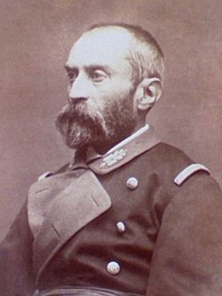 Eugène Razoua (1830-1877)